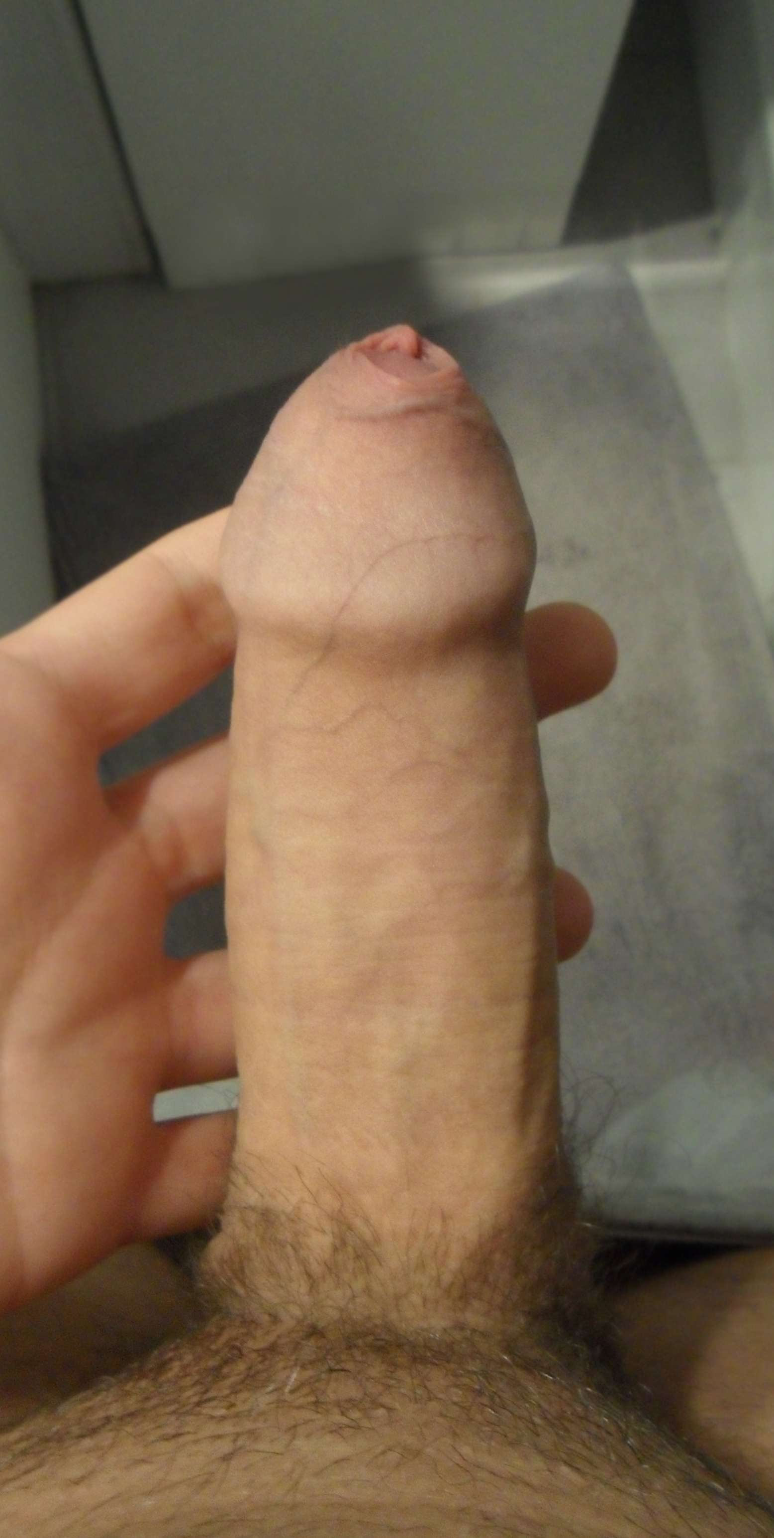 Penis présentant un Phimosis